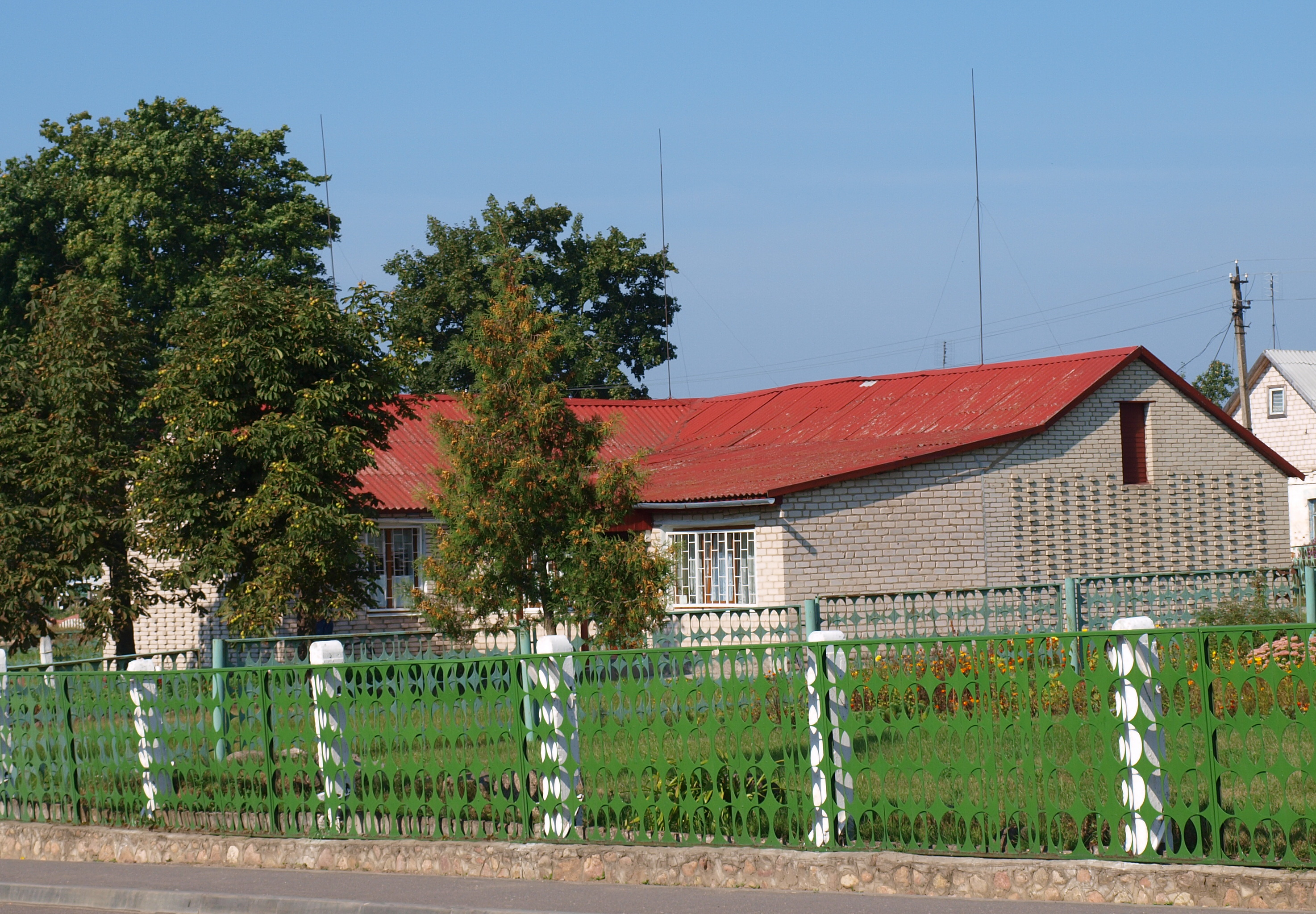 Музей Кузьмы Чорного (1900-1944), белорусского писателя, детские годы которого прошли в Тимковичах.